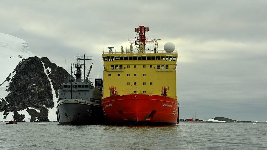 El rompehielos Almirante Irízar inició el reabastecimiento de la base Orcadas y el traslado de la dotación que trabajará allí, en el marco de la Campaña Antártica de Verano (CAV) 2017/2018 que lleva adelante el Ministerio de Defensa. Junto al aviso Estrecho de San Carlos, el buque polar trasladó además al Grupo Reparaciones, mientras que las naves Sea King reabastecieron con carga esta base.